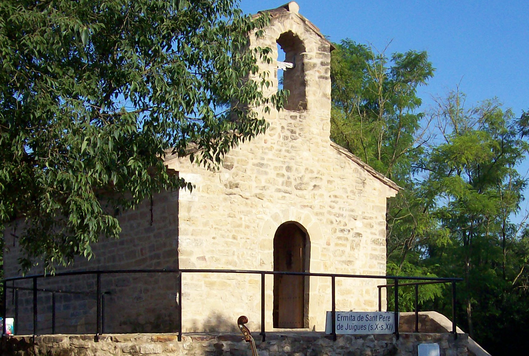 Església de Sant Pere de Juïgues (Vilademuls)